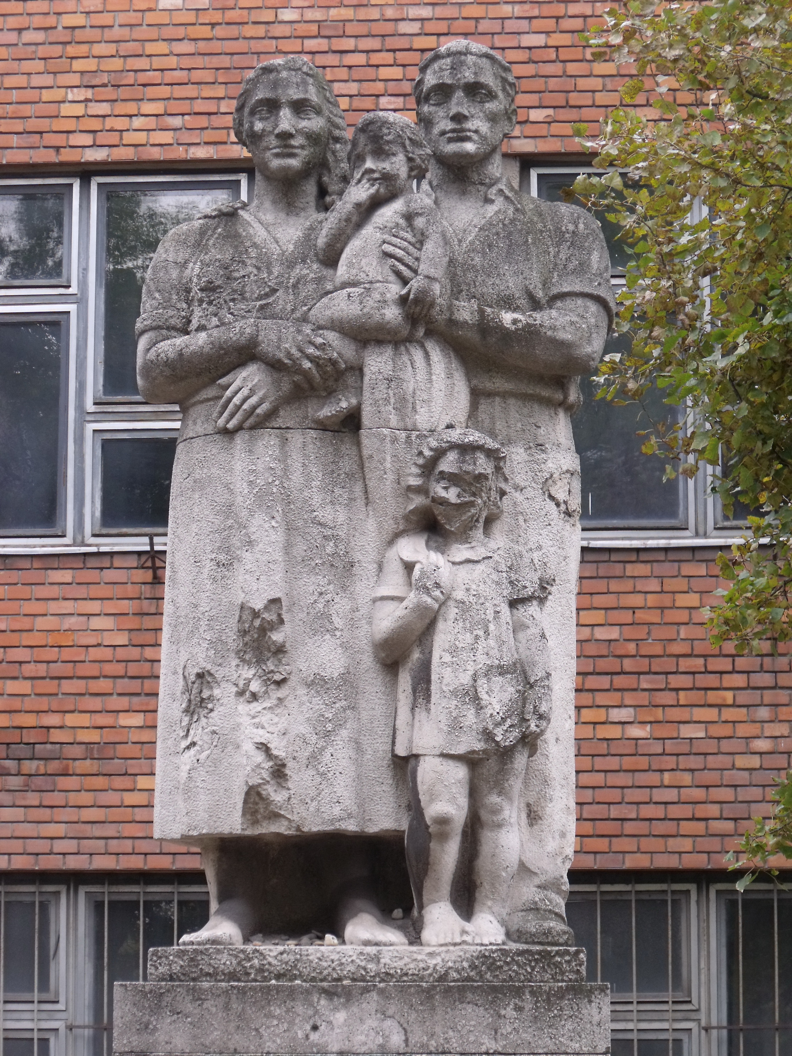 A Család szobra (Győri Dezső, 1941) - Magyarország, Budapest, X. kerület, Pongrác út 11., Pongrác-telepi Dísz téren.